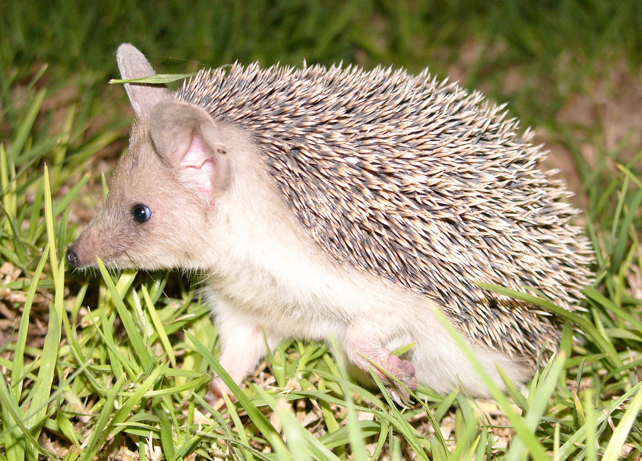 Hedgehog on Cyprus